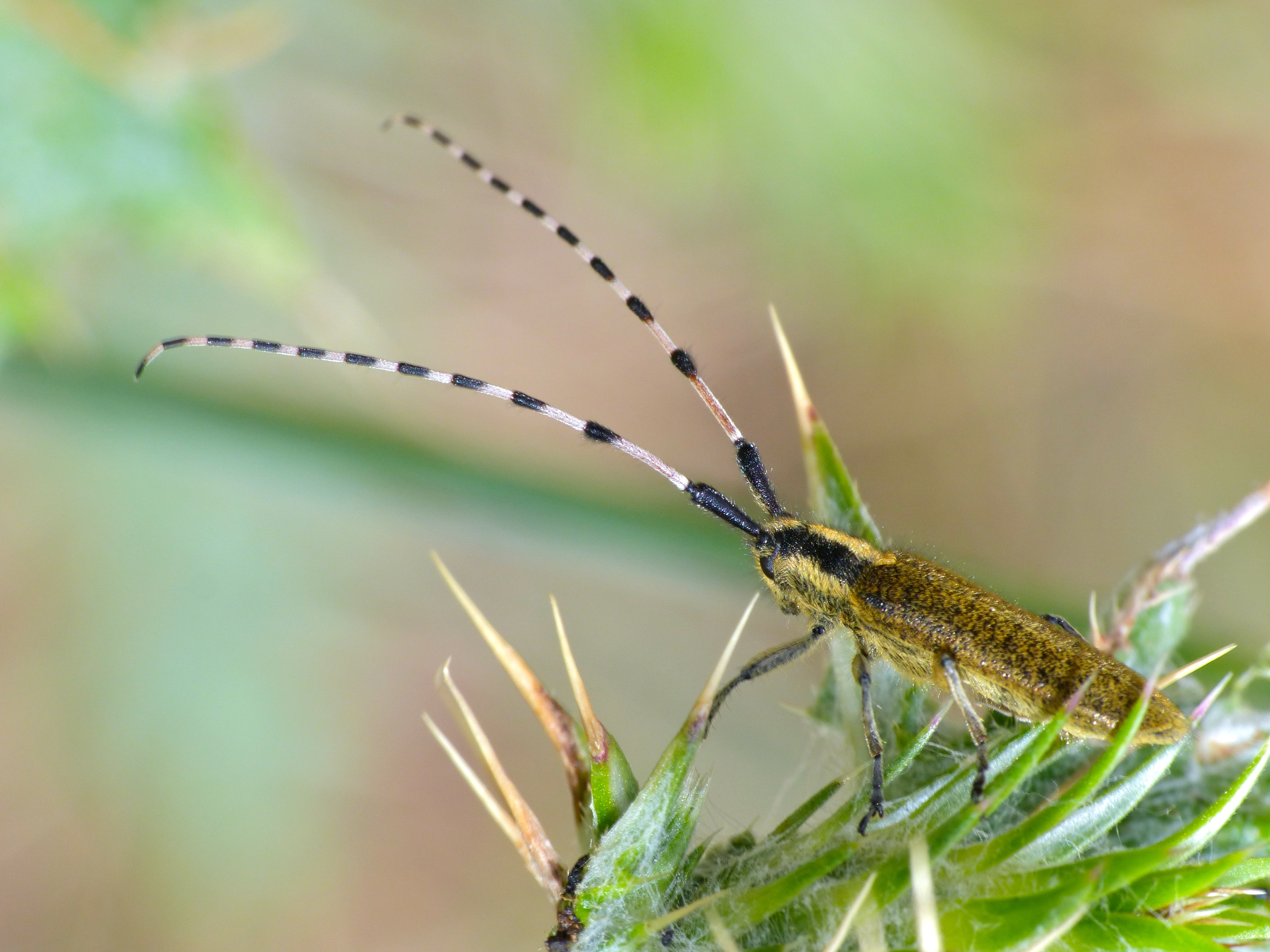 Octon, Hérault, FRANCE